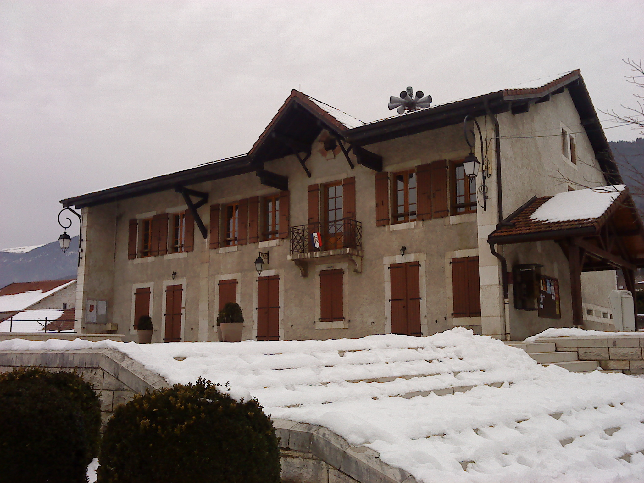 Mairie de Crozet, Ain, France